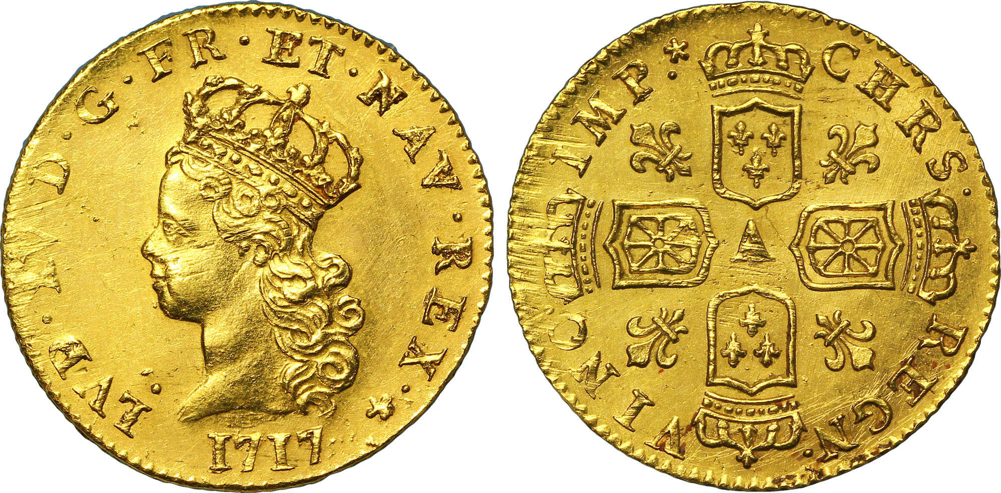 Date : 1717 Nom de l'atelier : Paris Quantité frappée : 333397 exemplaires Métal : or Titre en millième : 917‰ Diamètre : 23mm Axe des coins : 6h. Poids : 6,10g. Titulature avers : LVD. XV. D. G. FR. ET. NAV. REX. (Mm). Description avers : Tête de Louis XV à gauche, couronné, les cheveux longs ; au-dessous 1717. Traduction avers : (Louis XV, par la grâce de Dieu, roi de France et de Navarre). Titulature revers : CHRS. - REGN. - VINC. - IMP. (Mg). Description revers : Croix formée de quatre écus couronnés, un de France, en haut et en bas, un de Navarre à dextre et senestre, accostée de quatre lis, lettre d'atelier en cœur. Traduction revers : (Le Christ règne, le Christ vainc, le Christ commande).